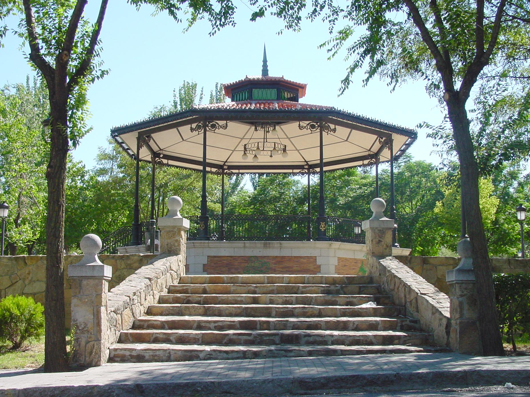 Templete del Parque Municipal de Brunete.